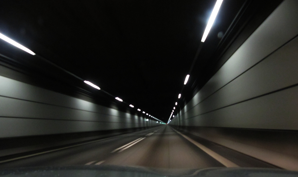 Im Drogdentunnel, der auf die Öresundbrücke führt (Dänemark)